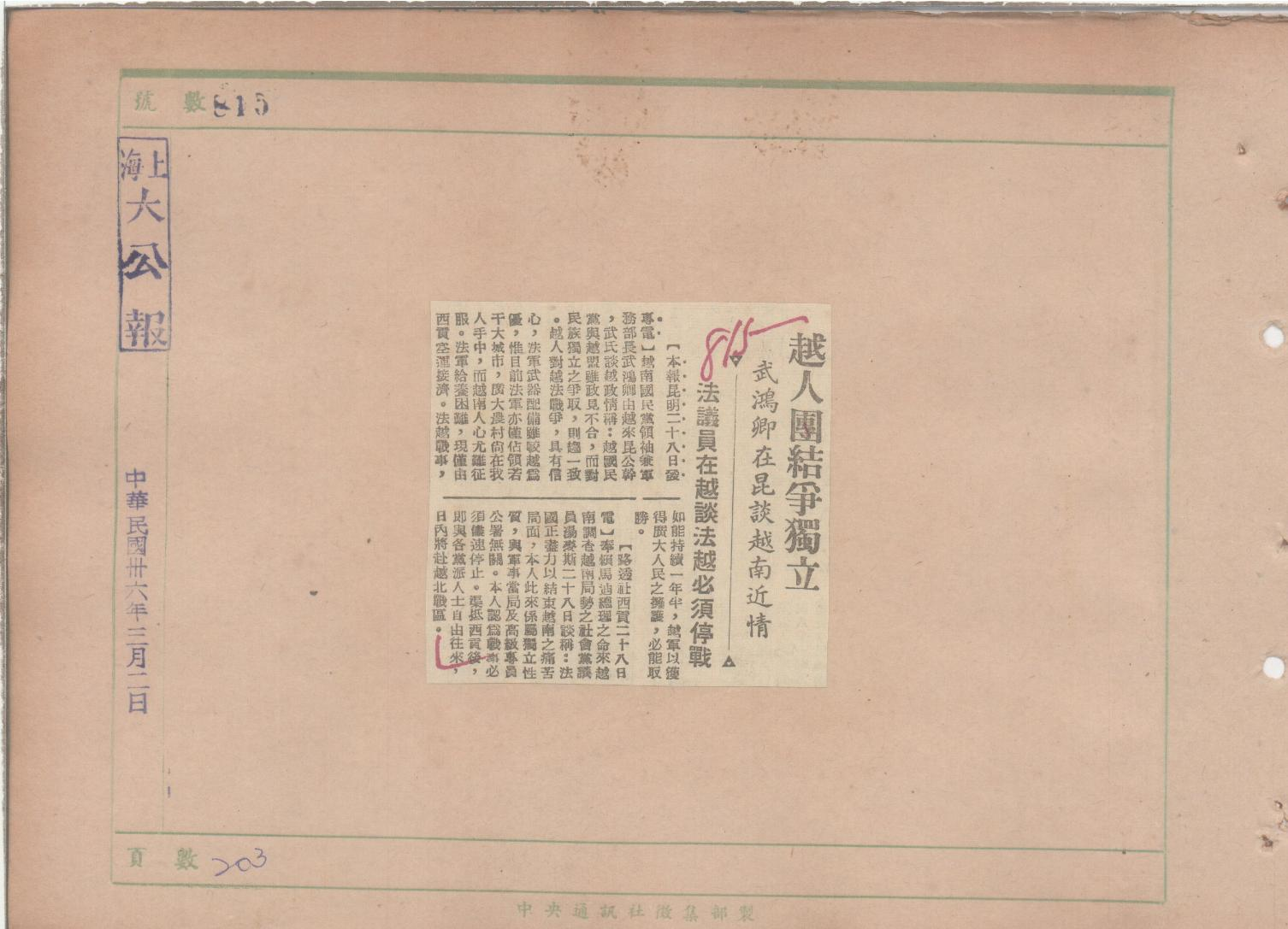 越人團結爭獨立 武鴻卿在昆談越南近情 法議員在越談法越必須停戰